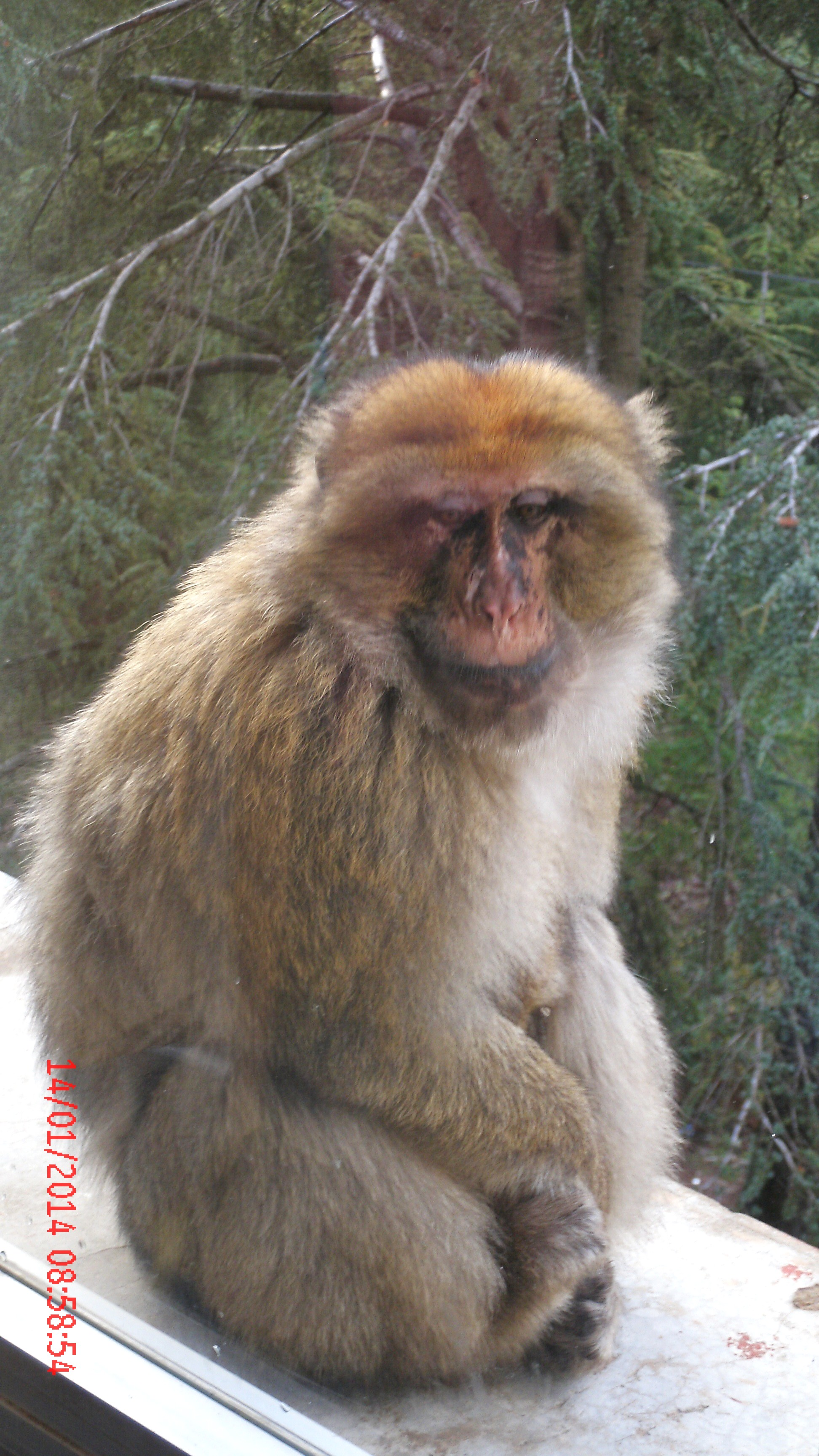 Un singe magot à Tikjda